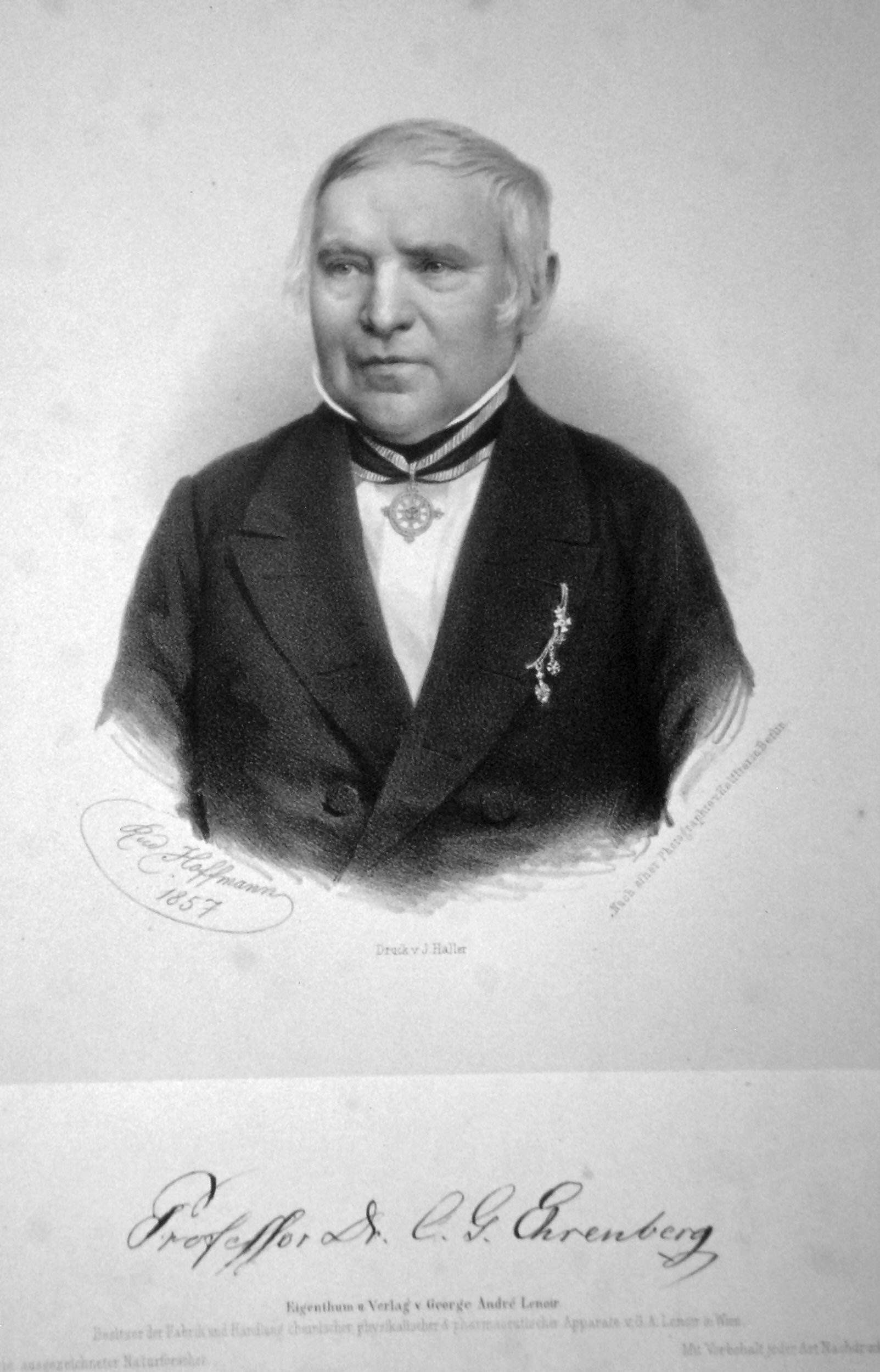 Christian Gottfried Ehrenberg (1795-1876), deutscher Naturforscher. Lithographie von Rudolf Hoffmann nach einer Fotografie vonHallfter.